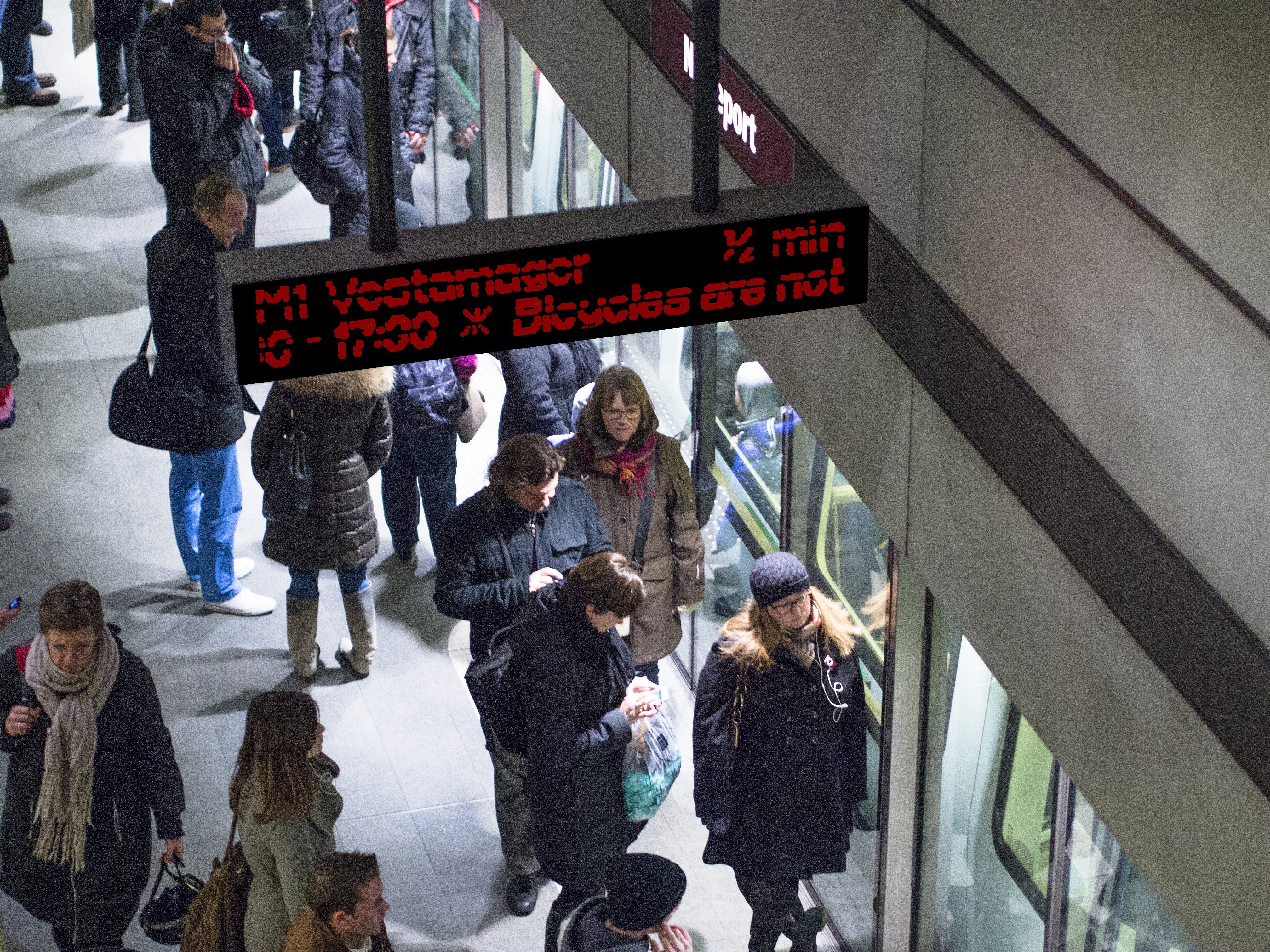 Metro i Köpenhamn, Nørreport station 20120131. Metroen i København, Subway, Copenhagen. Foto: News Øresund – Johan Wessman © News Øresund. Bilden får fritt publiceras under förutsättning att källa anges (Foto: News Øresund + fotografnamn). (The picture can be used freely under the prerequisite that the source is given. ) Originalfil tillhandahålles gratis, kontakta: News Øresund, Malmö, Sweden. News Øresund är en oberoende regional nyhetsbyrå som ingår i projektet Øresund Media Platform som drivs av Øresundsinstituttet i partnerskap med Lunds universitet och Roskilde Universitet och med delfinansiering från EU (Interreg IV A Öresund) och 14 regionala, icke kommersiella aktörer.